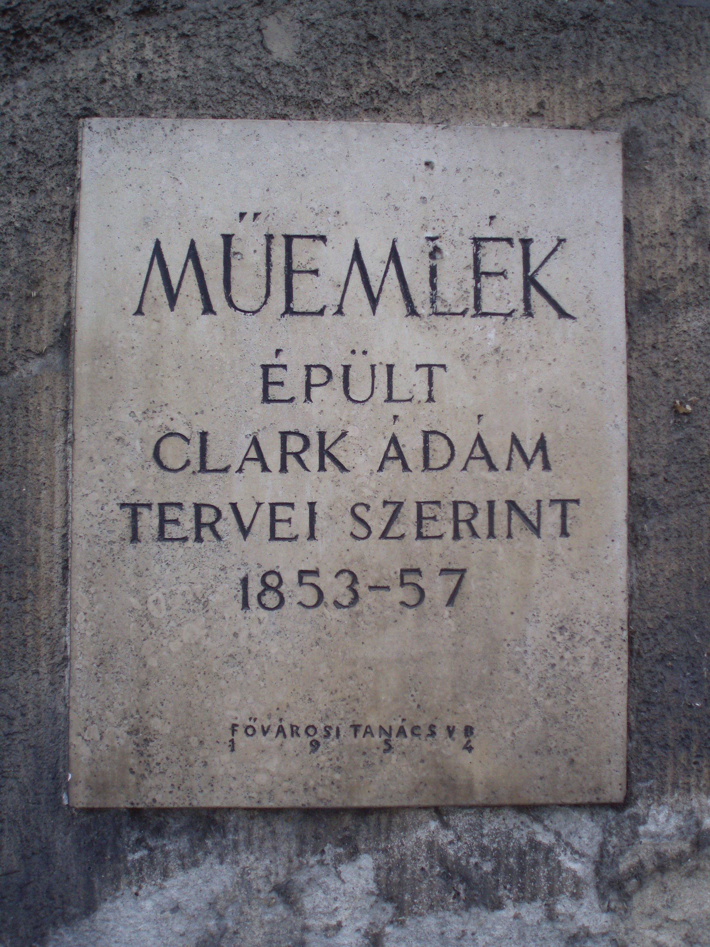 Emléktábla a budai Váralagút Lánchíd felőli kapuzatánál. Budapest, Clark Ádám tér.